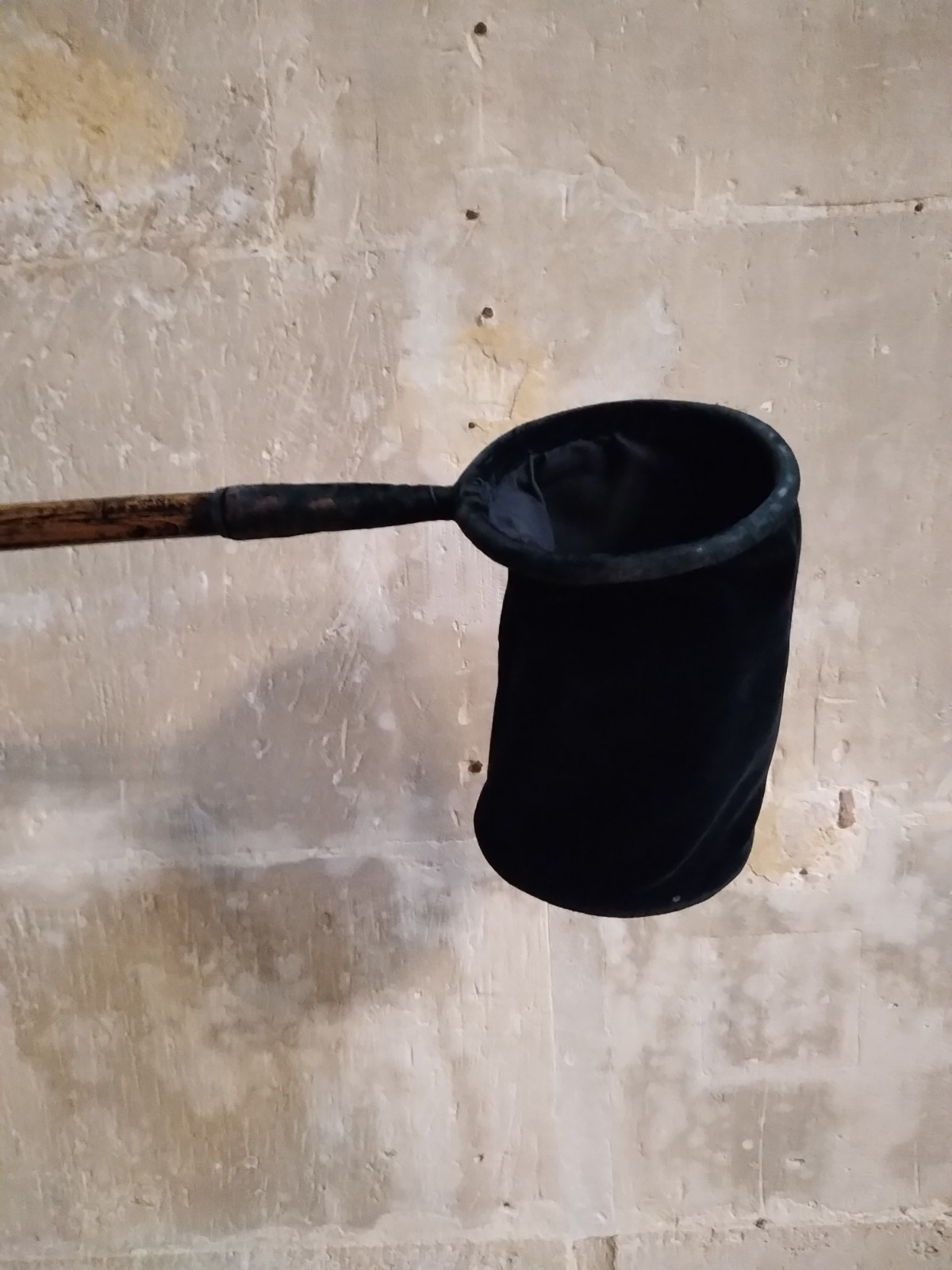 Quêteuse en velour noir pour récolter la quête dans le respect de l'anonymat du don